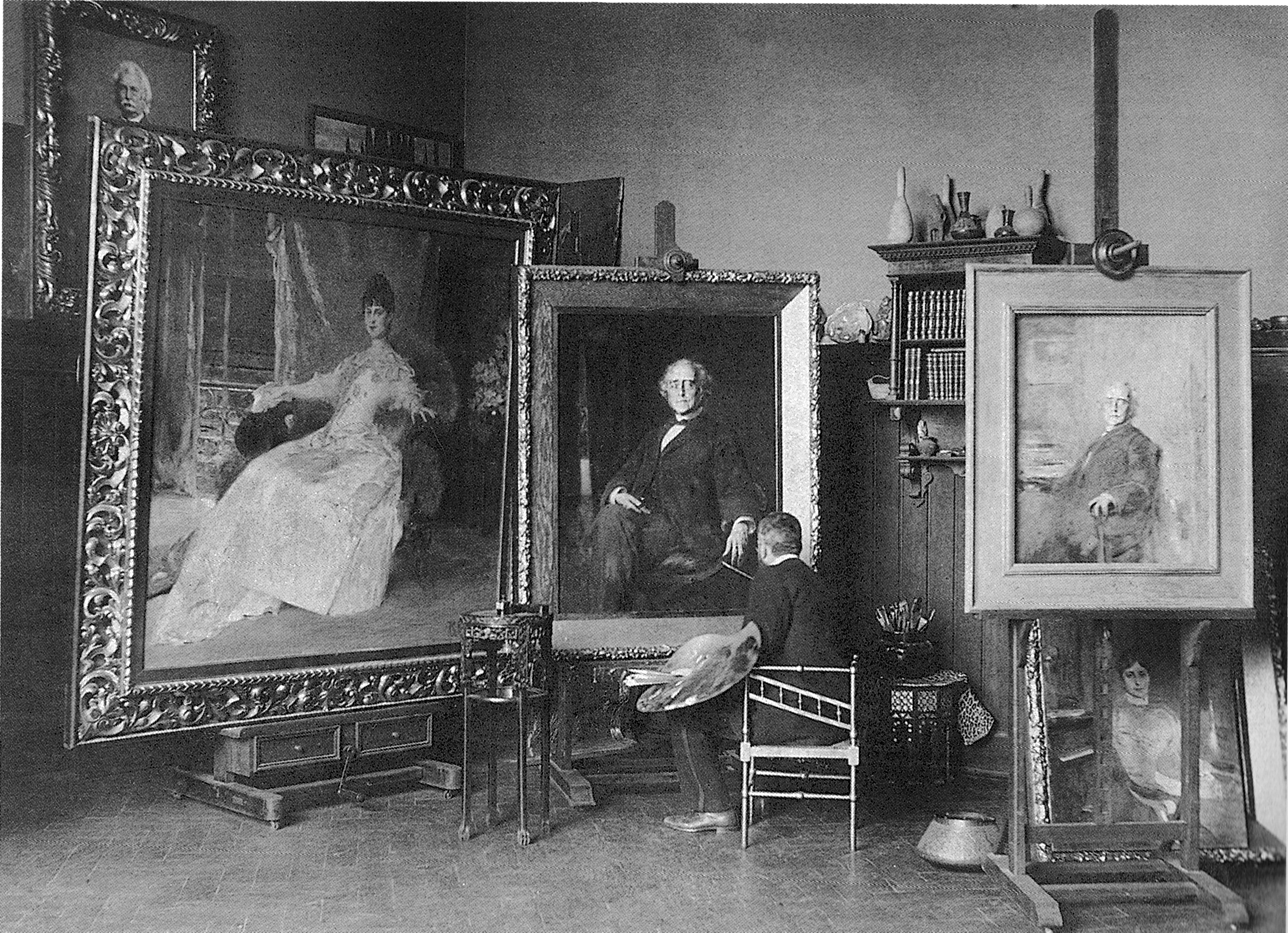 Reinhold Lepsius in seinem Münchner Atelier, 1892 Links das großformatige ganzfigurige Damenporträt Charlotte Hahns, der Mutter des Pädagogen Kurt Hahn, dahinter das Bildnis des Vaters von Reinhold Lepsius- Richard Lepsius. Im Mittelpunkt stehen die zwei frontal angeordneten Staffeleien mit den Porträts von Ernst Curtius. Eine Fotoinszenierung Carl Teufels.